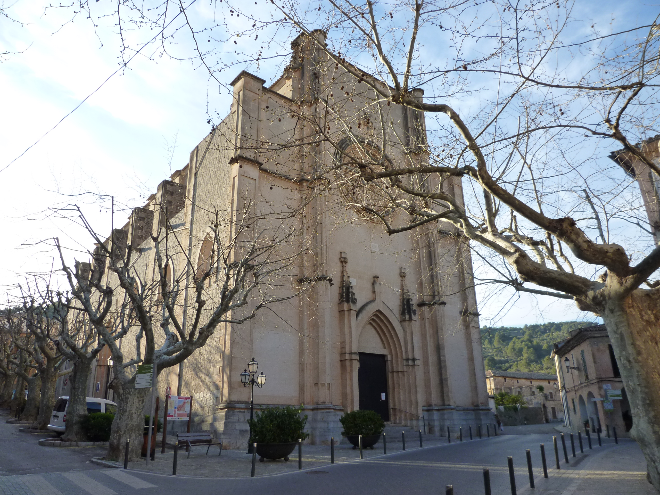 Blick auf die Kirche in Esporles/Insel Mallorca/Spanien.